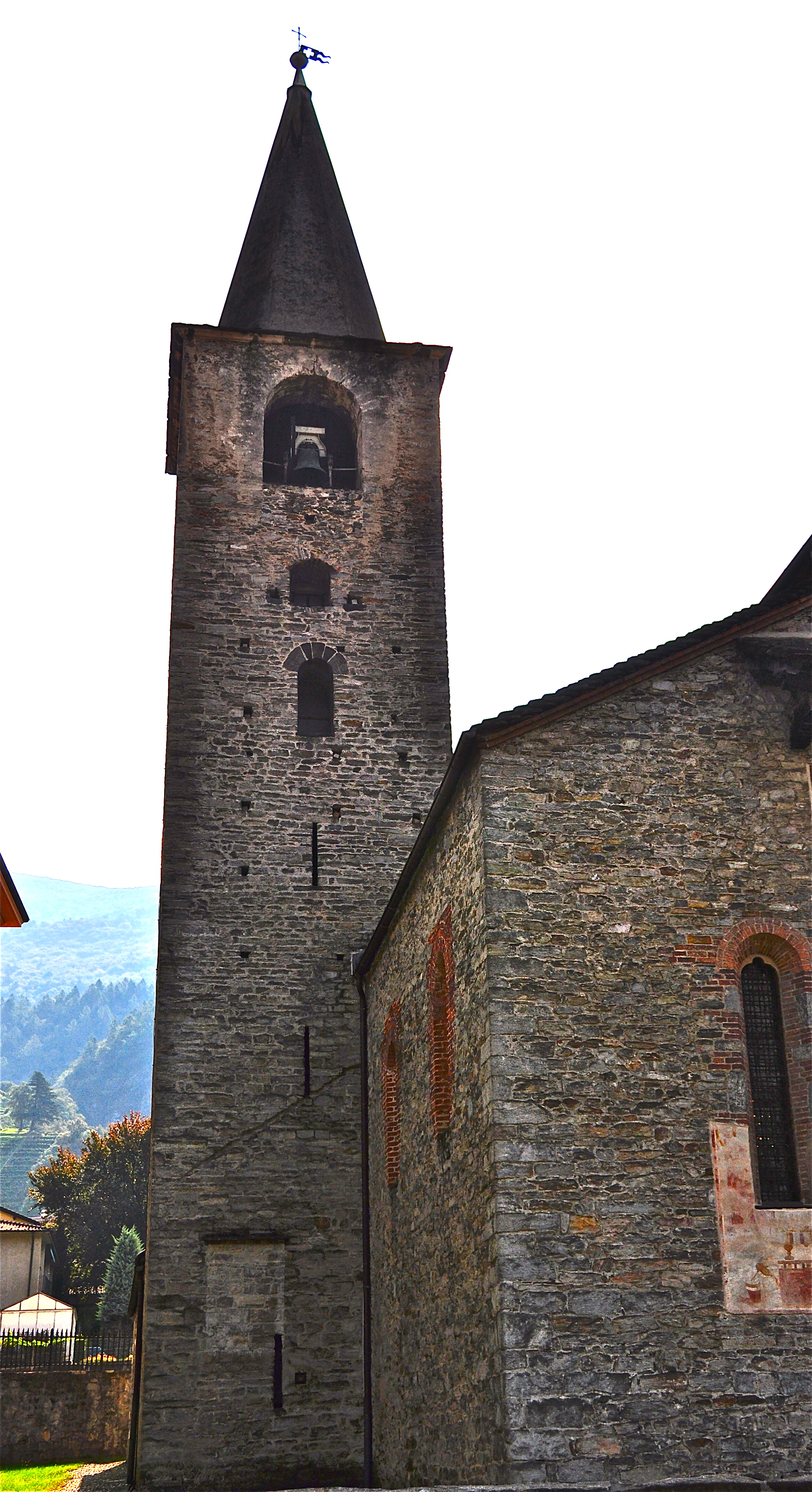 Vista laterale della Chiesa San Biagio (torre).